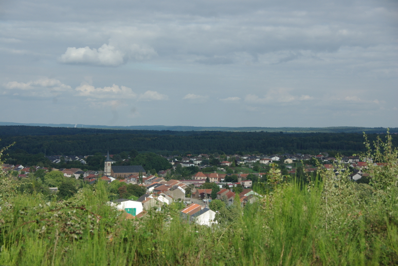 Vue d'une partie du village (Mairie et Église) de Porcelette